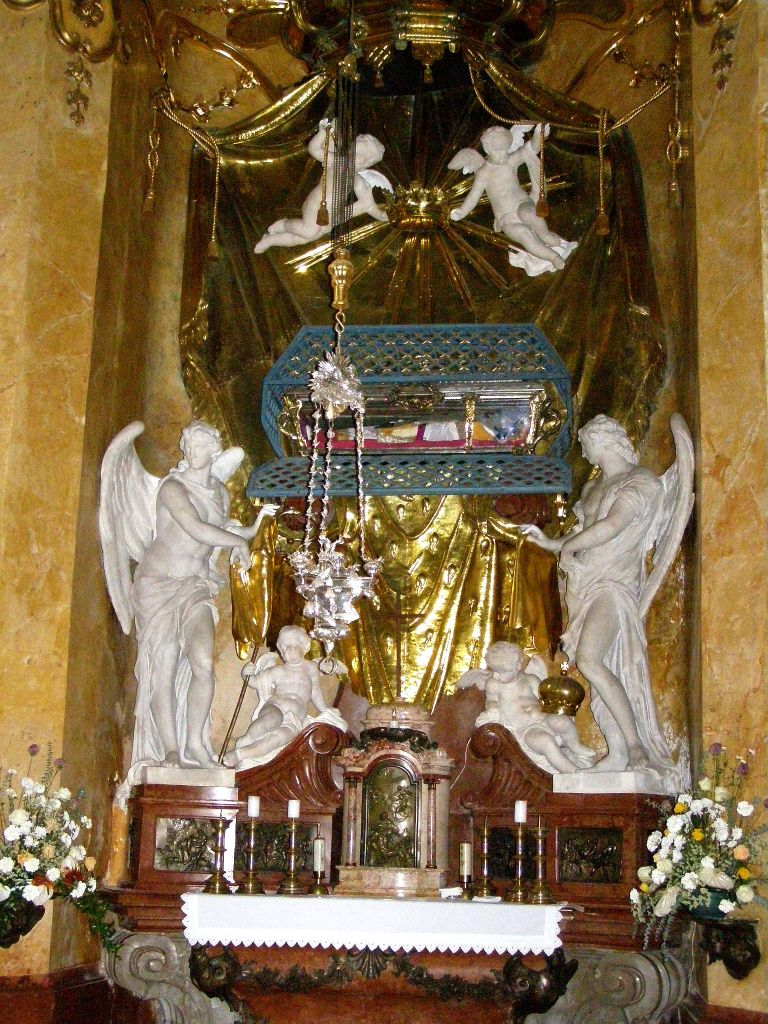 Svätcove ostatky sú uložené v striebornej rakve nad bohostánkom